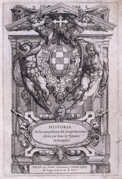 Portada de la primera edición de la Historia de la composición del cuerpo humano, Roma, 1556.